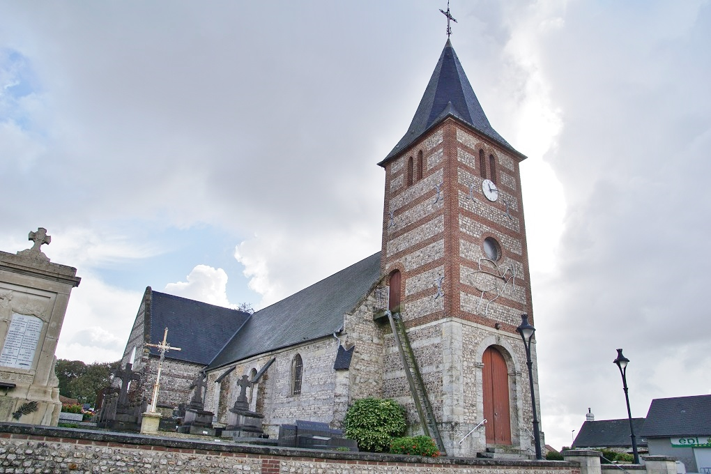 Église Saint-Denis d'Épreville (76).